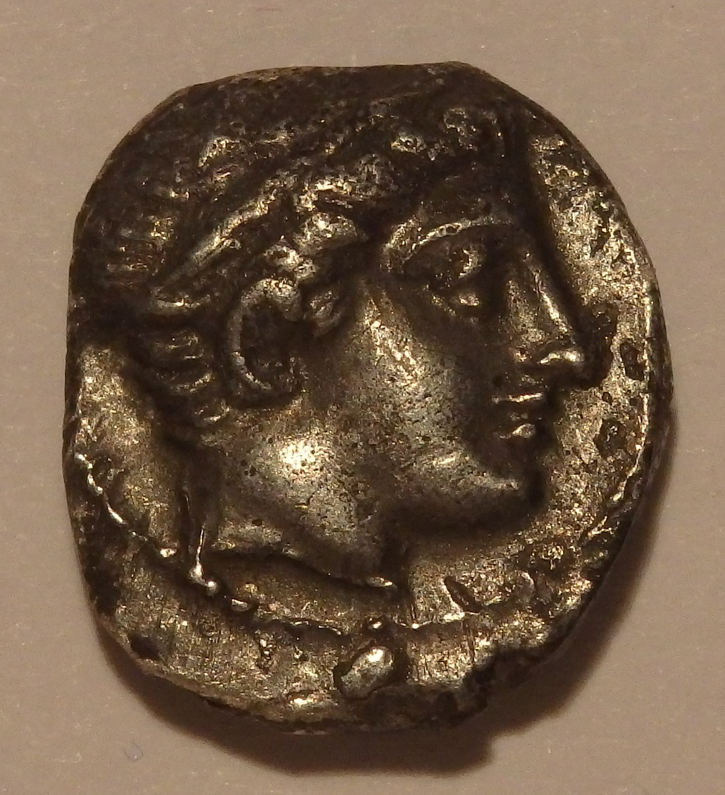 Apollokopf auf Tetrobol von Philipp von Makedonien